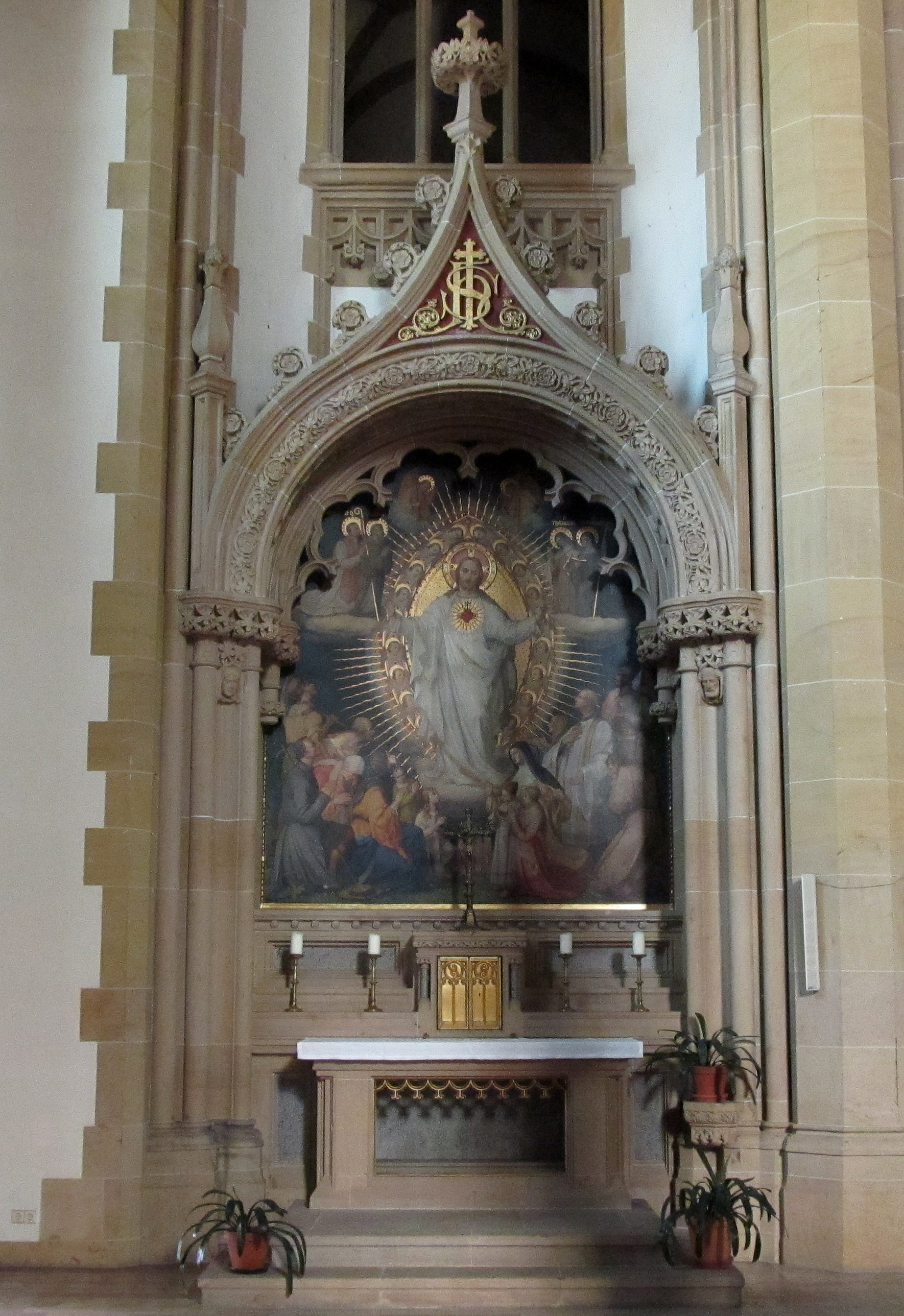 Seitenaltar der katholischen Pfarrkirche St. Joseph in Speyer, Rheinland-Pfalz